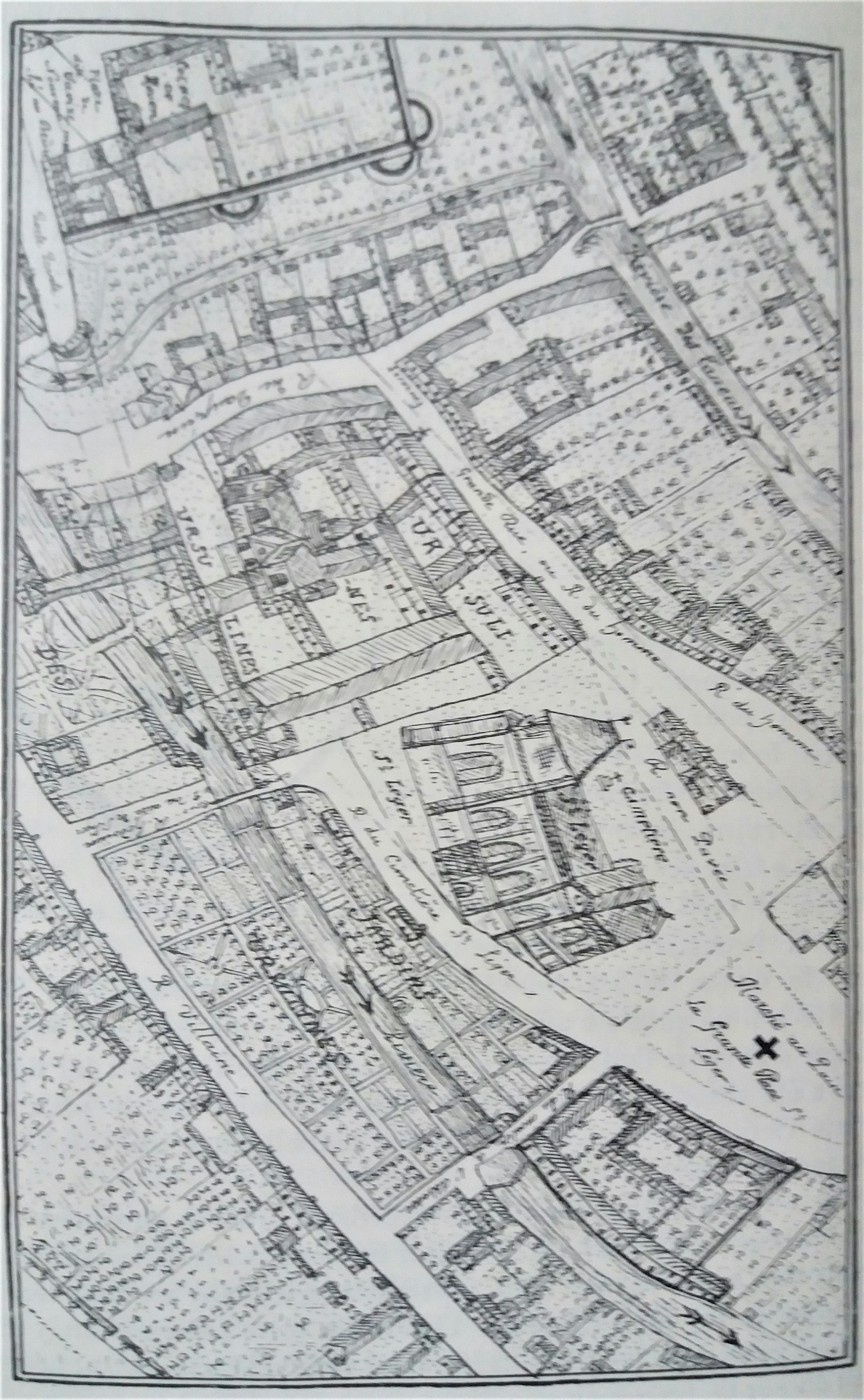 Dessin de la grand-place Saint-Léger à Evreux, par l'abbé René Delamare (Calendrier spirituel, p. 302).